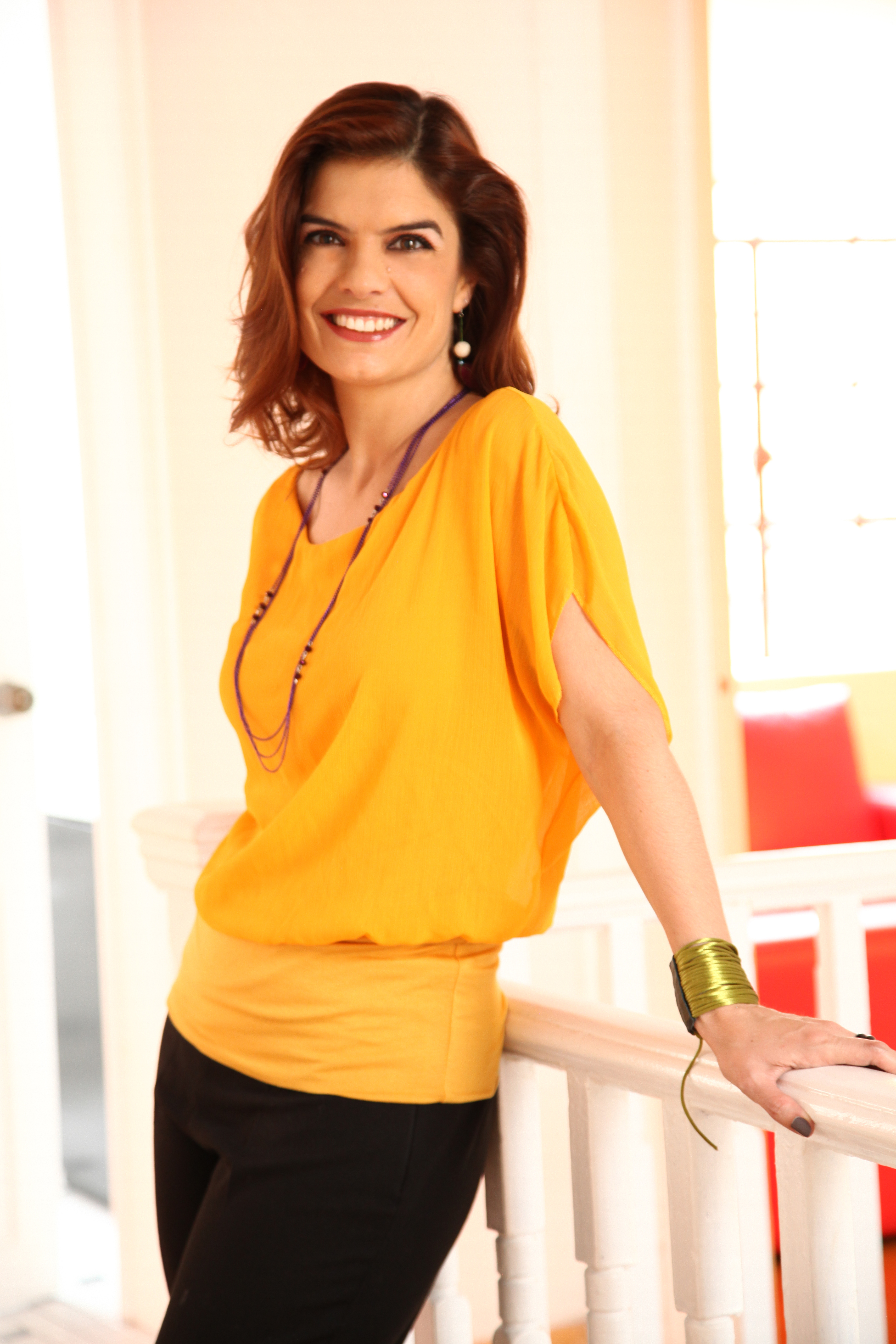 Conductora de radio y televisión